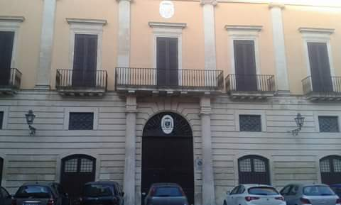 Palazzo Vescovile a Nardò (LE)-PUGLIA-ITALY